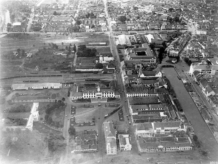 Repronegatief. Batavia (Oude stad), luchtfoto van het stadhuis en omgeving